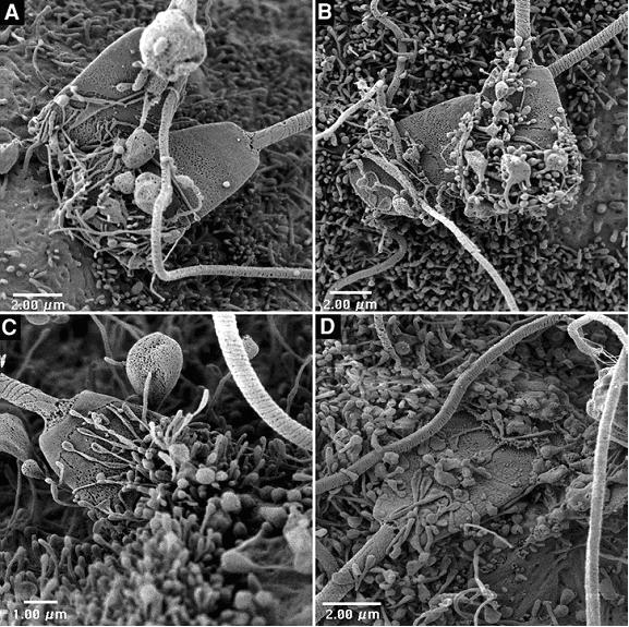 bovine fertilization